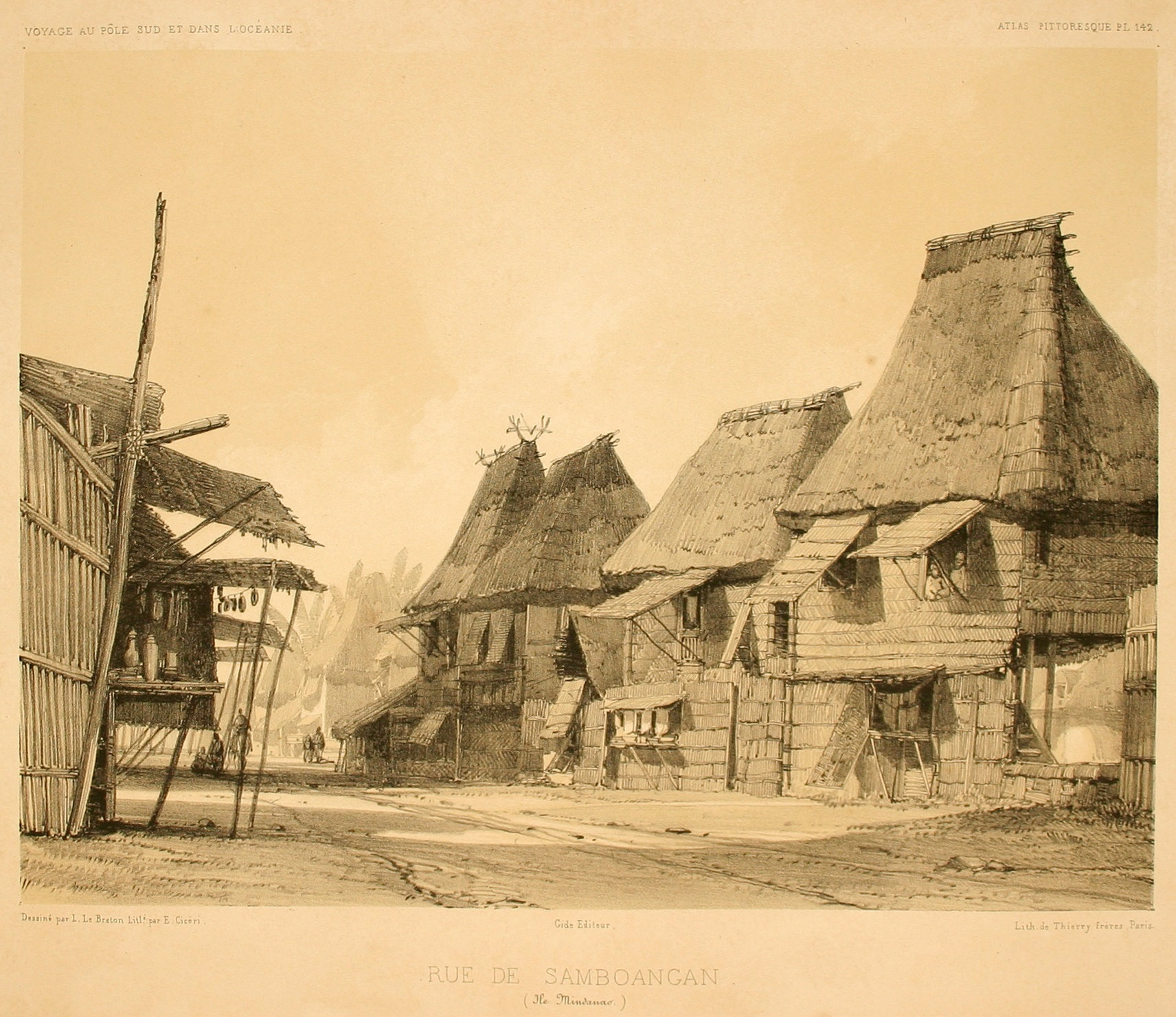 Une rue de Samboangan. Atlas pittoresque, planche 142.